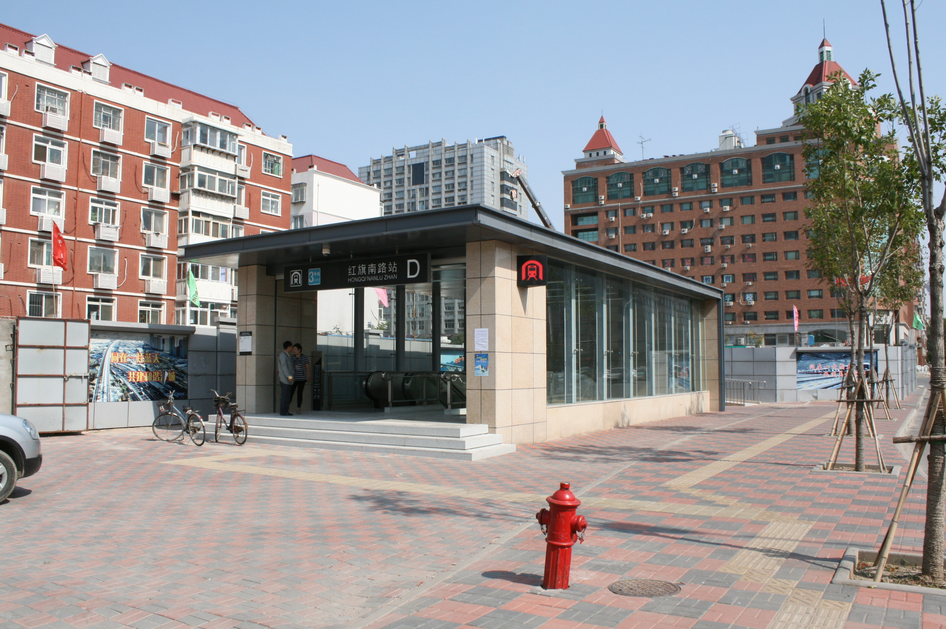 天津地鐵三號線紅旗南路站D口 0001